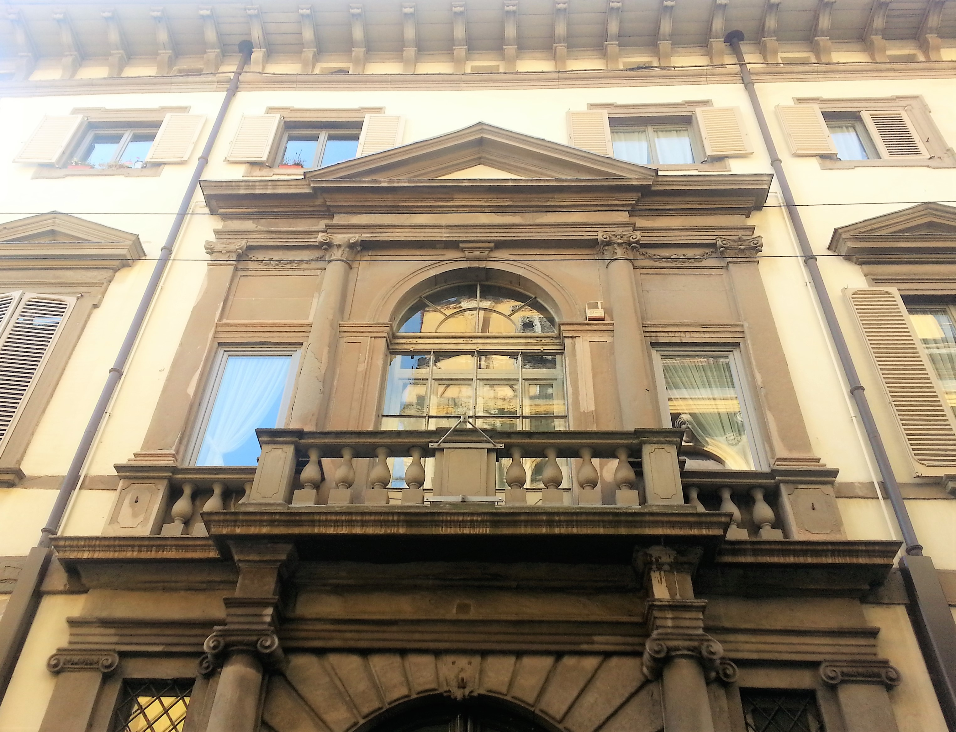 Particolare della facciata di palazzo Grataroli Marenzi